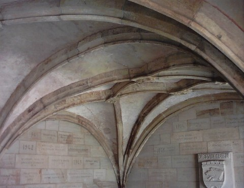 Das Netzgewölbe des ehemaligen Beinhauses neben der Pfarrkirche Ebern in Unterfranken. Eigene Aufnahme, 2005